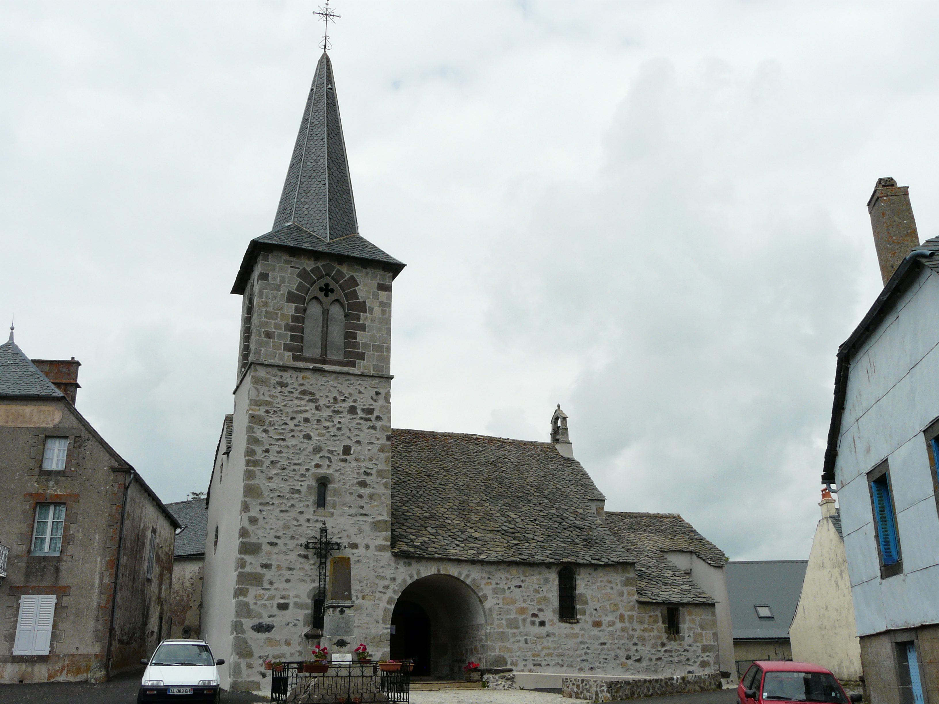 L'église Saint-Laurent de Montgreleix, Cantal, France.